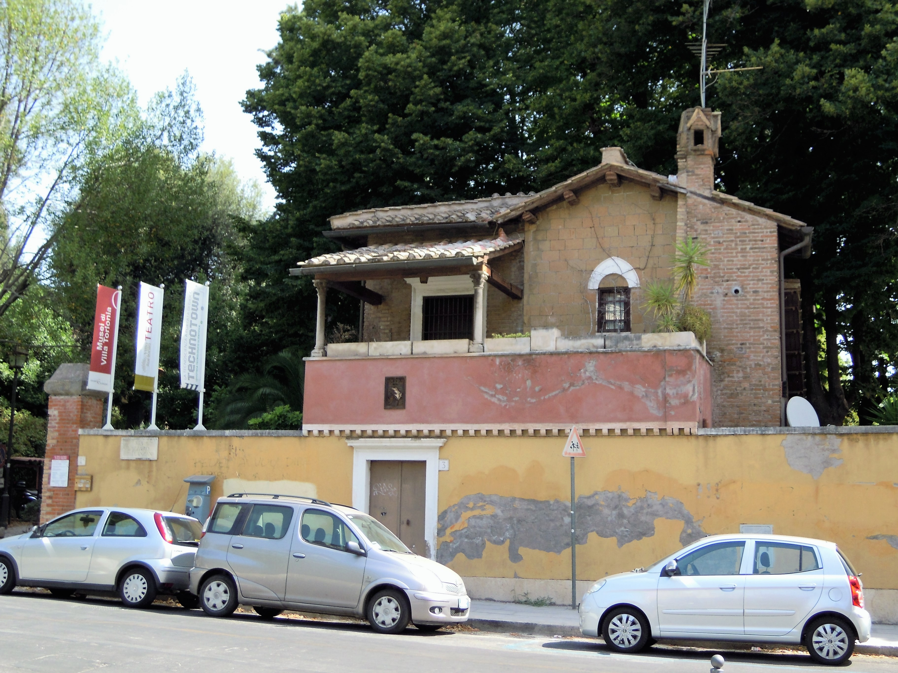 Roma, Villa Torlonia: villino di portineria all'ingresso di via Spallanzani